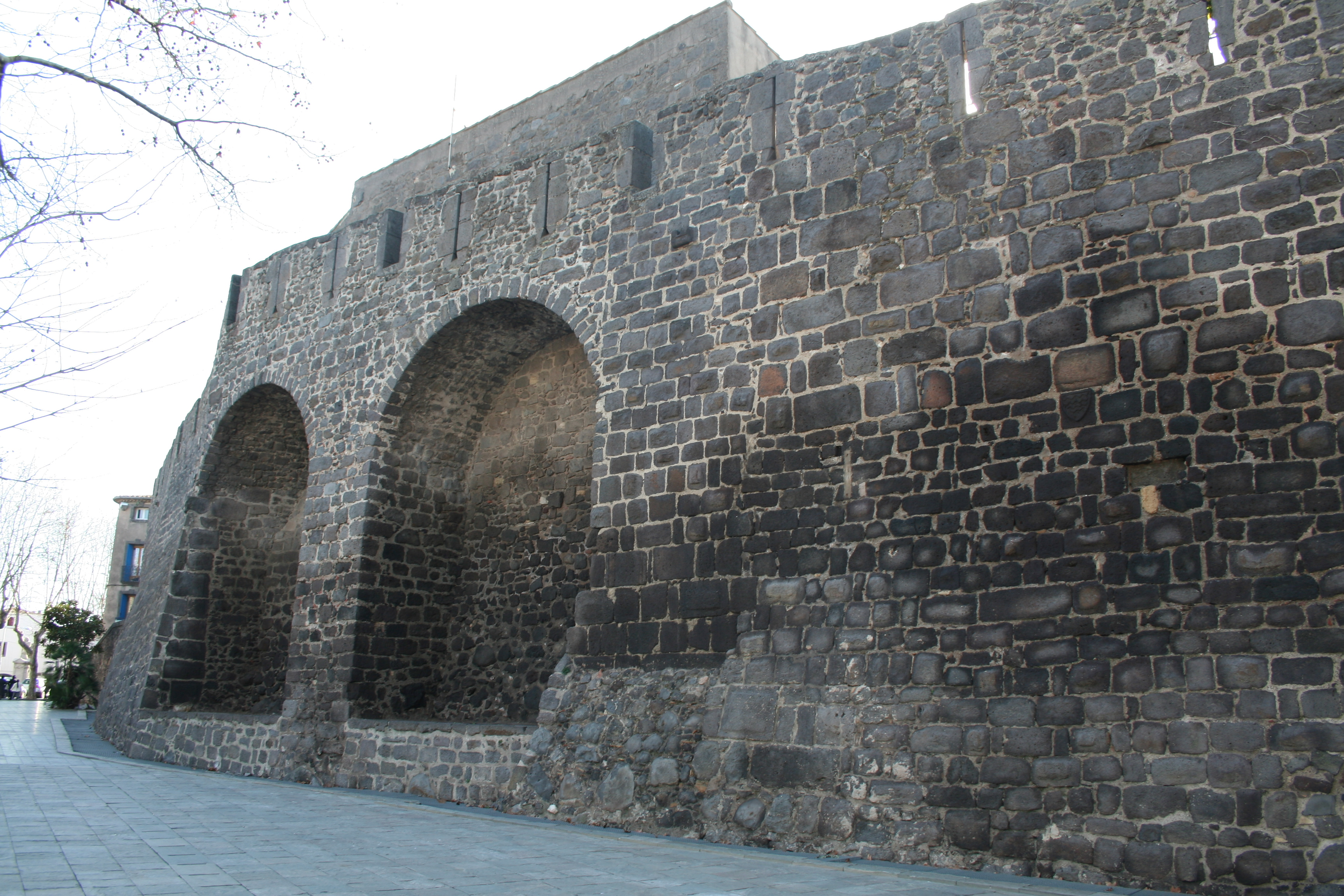 Agde (Hérault) - rempart.